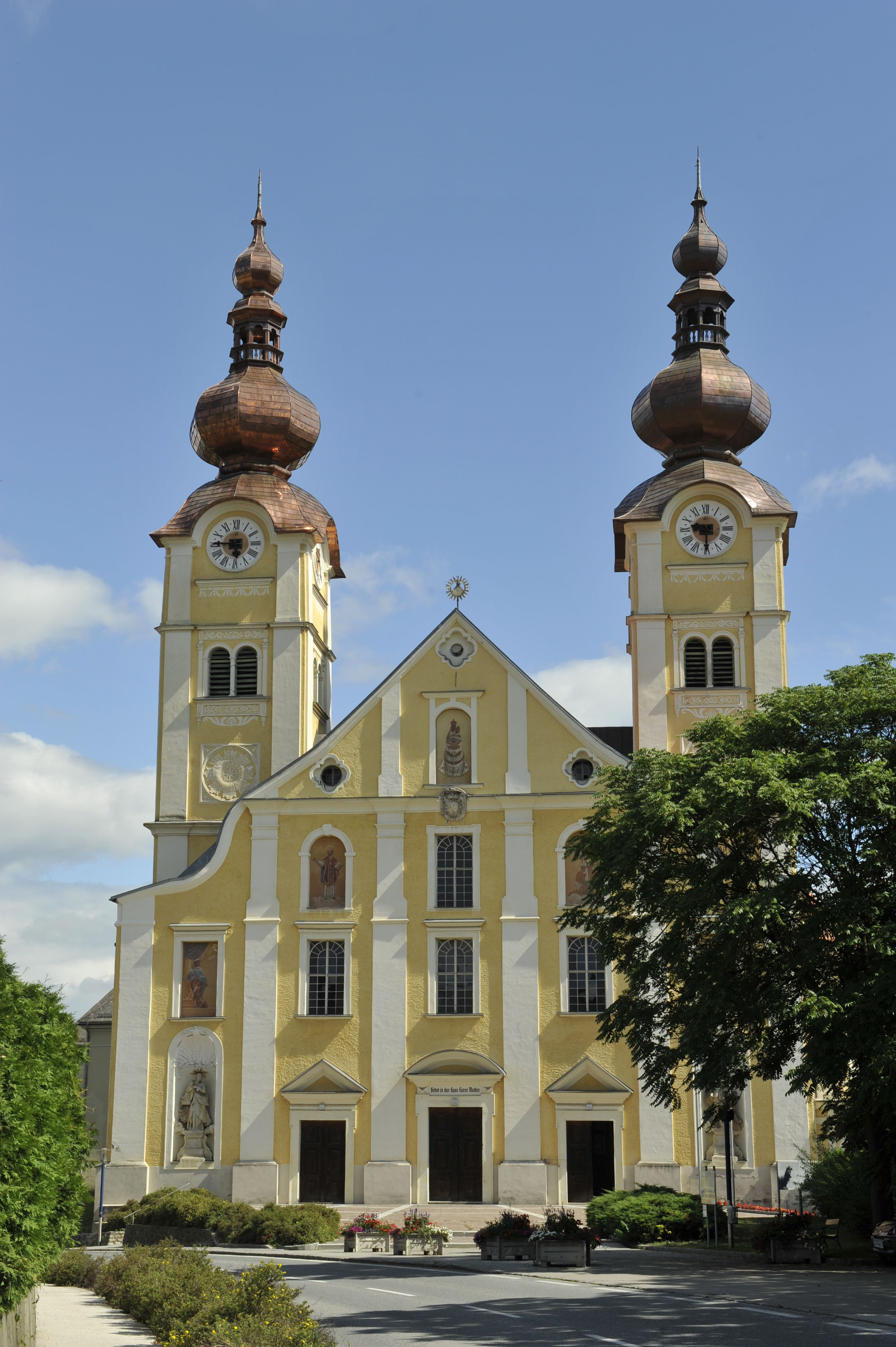 Die Basilika zählt zu den größten Barockkirchen Kärntens